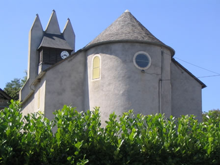 Eglise à clocher trinitaire de Berrogain Pyrénées).